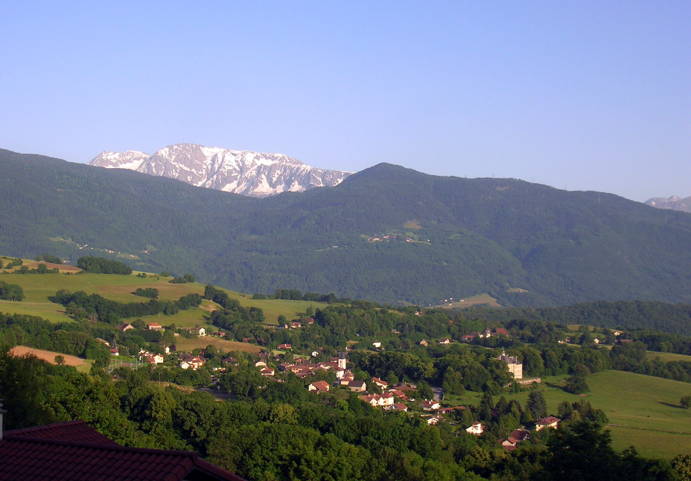 Panorama de Herbeys, Isère, Rhone-Alpes, France.